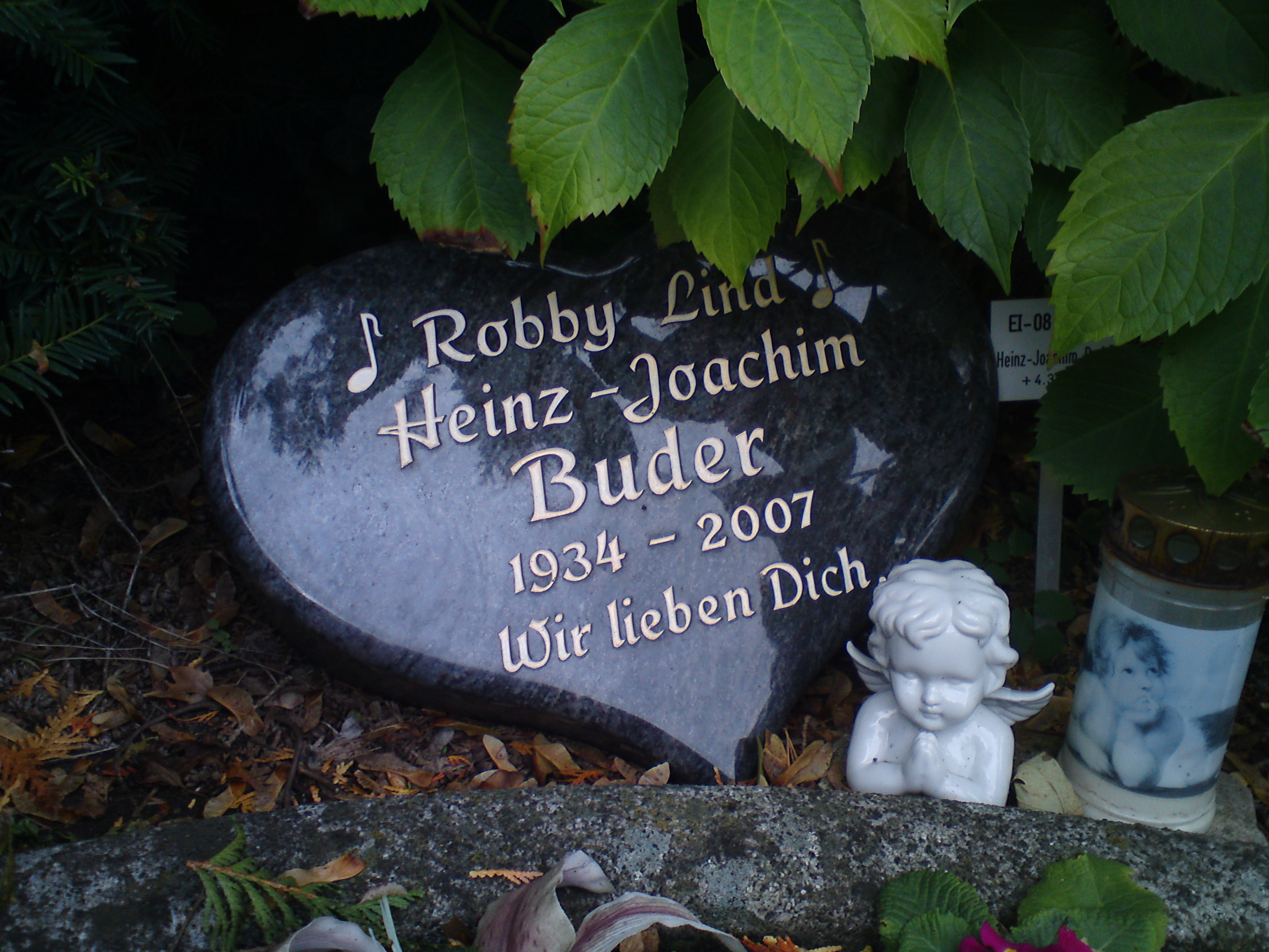 Grabstein Heinz-Joachim Buder